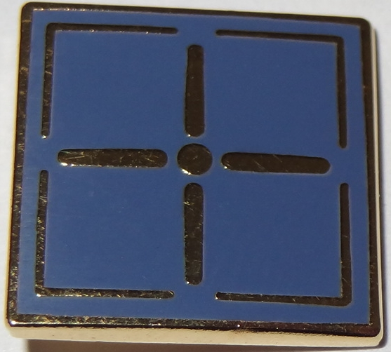 Die blau-graue Nadel wird für den ITIL-Expert-Level verliehen, wenn die Voraussetzungen erfüllt sind.